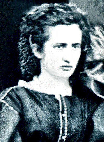 Susanne Friederike Berta Freifrau Lenk von Wolfsberg 1865